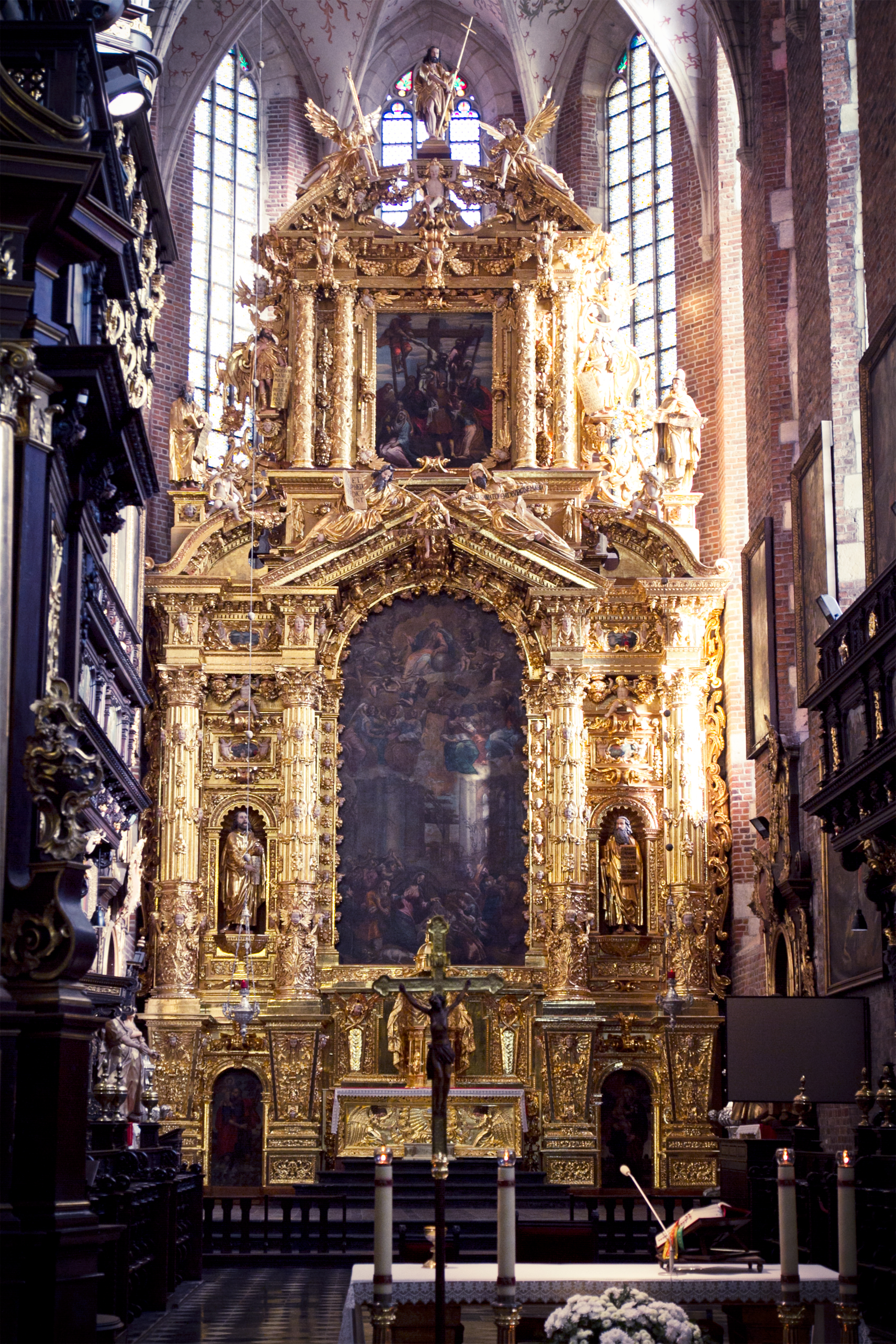 Ołtarz główny z obrazami Tomasza Dolabelii